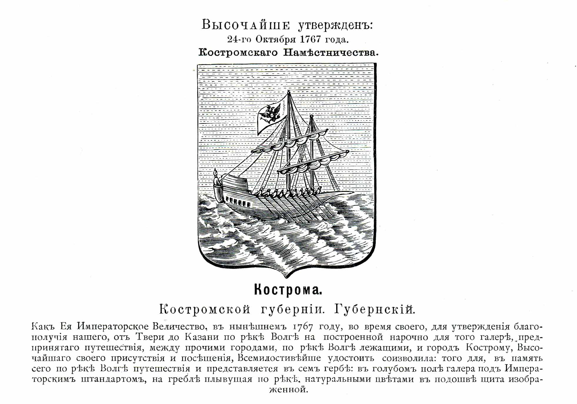 Official Russian Empire coat of arms Kostroma. Герб Российской Империи губернского города Кострома с официальным описанием в Гербовнике Винклера.